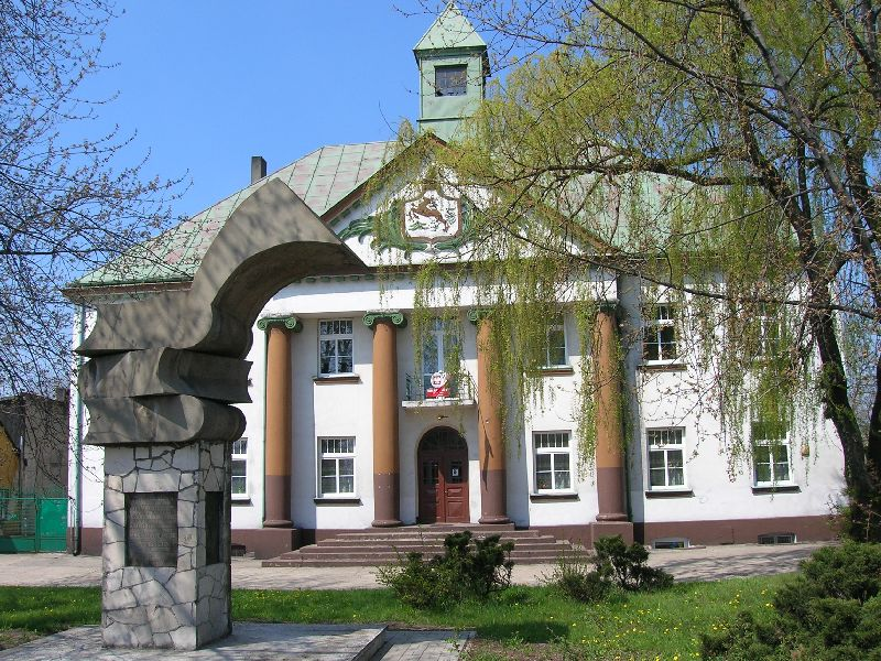 Stryków - pomnik książki.